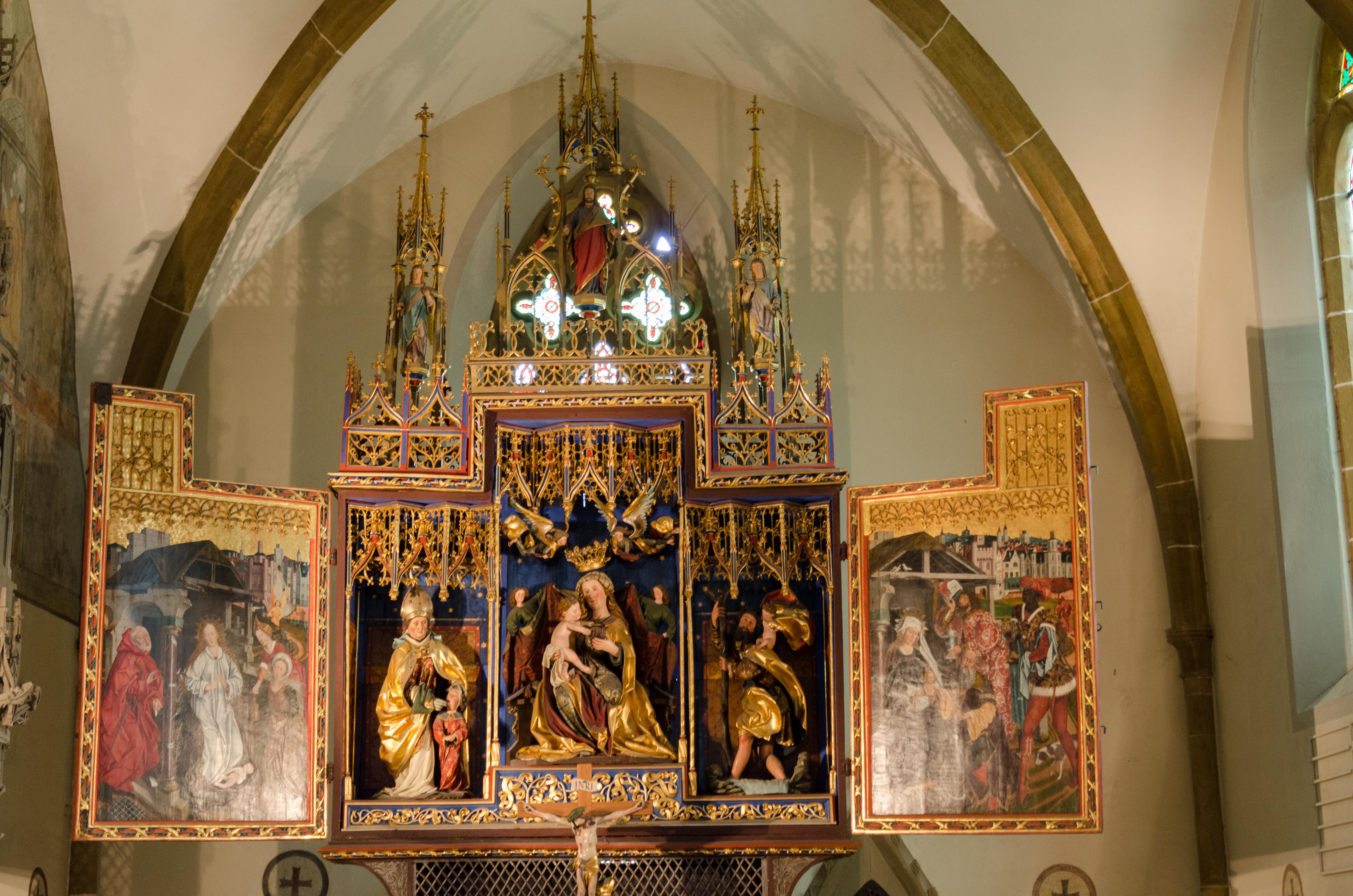 Bopfingen, Stadtkirche St. Blasius